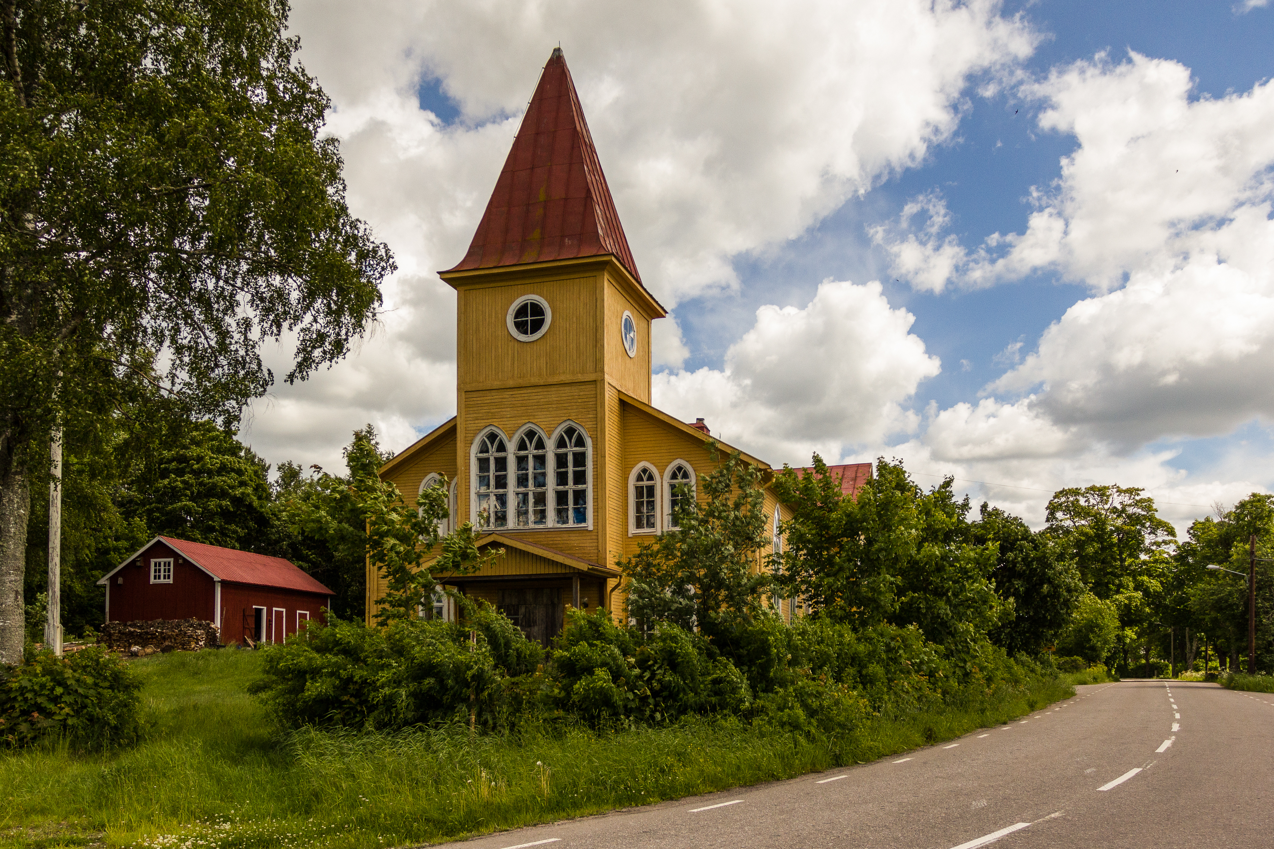 Missionskyrkan i Sandby, Tierps kommun, Sverige (Sandby 67:1). En av Uppsala läns första och största frikyrkobyggnader när den uppfördes 1882.[1]